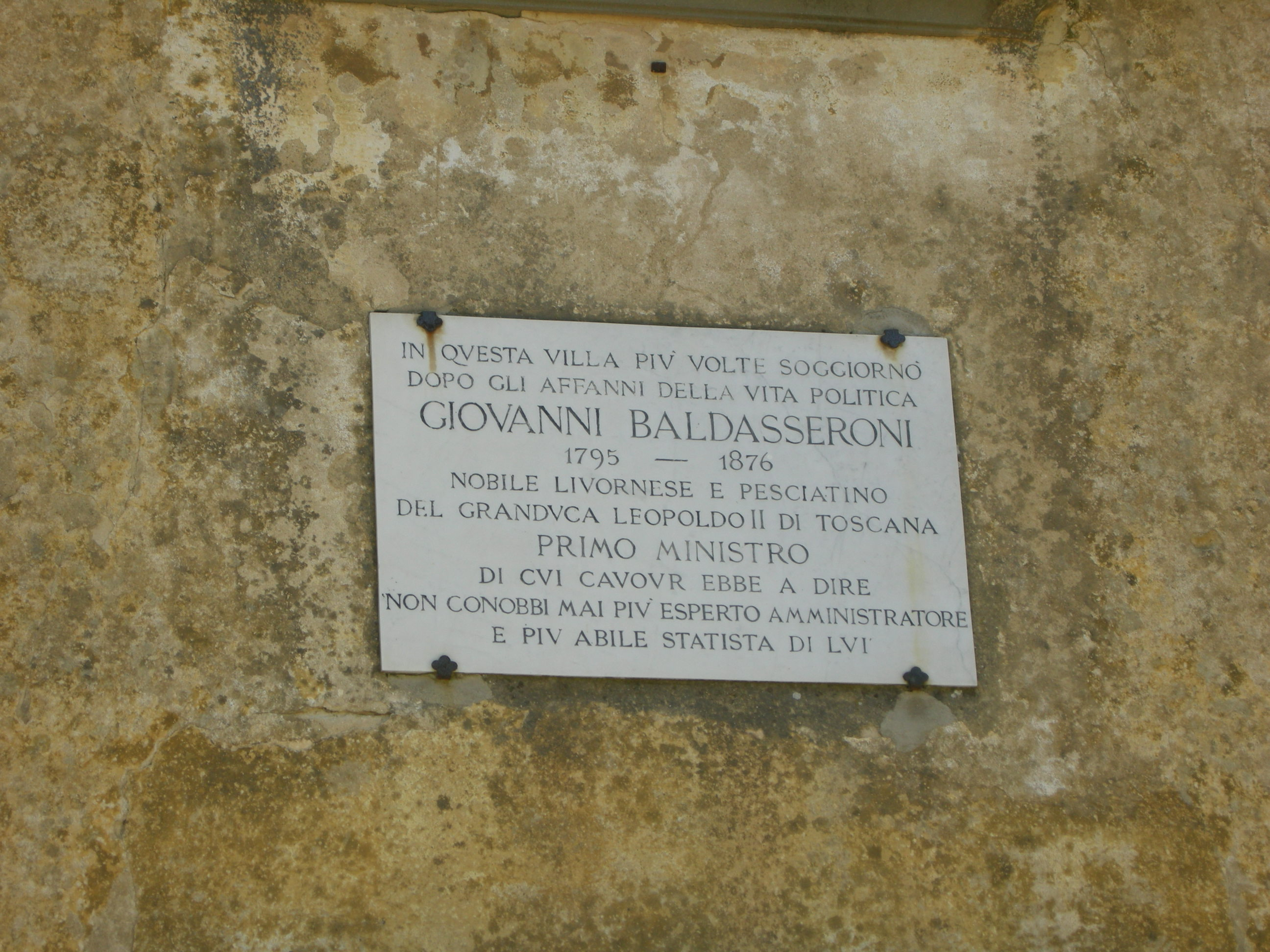 Villa badasseroni, targa 01 giovanni baldasseroni